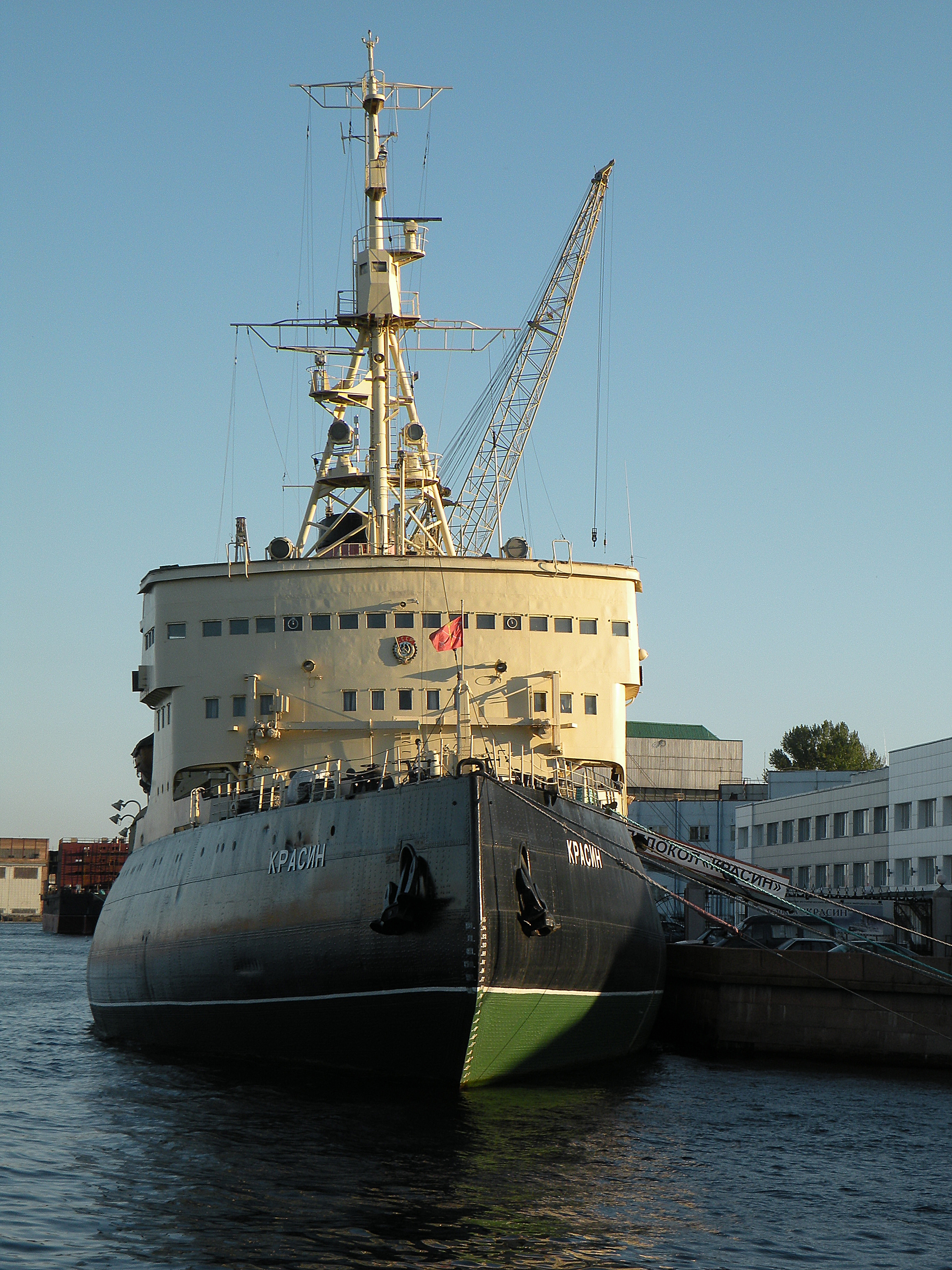 Ледокол Красин с форштевня